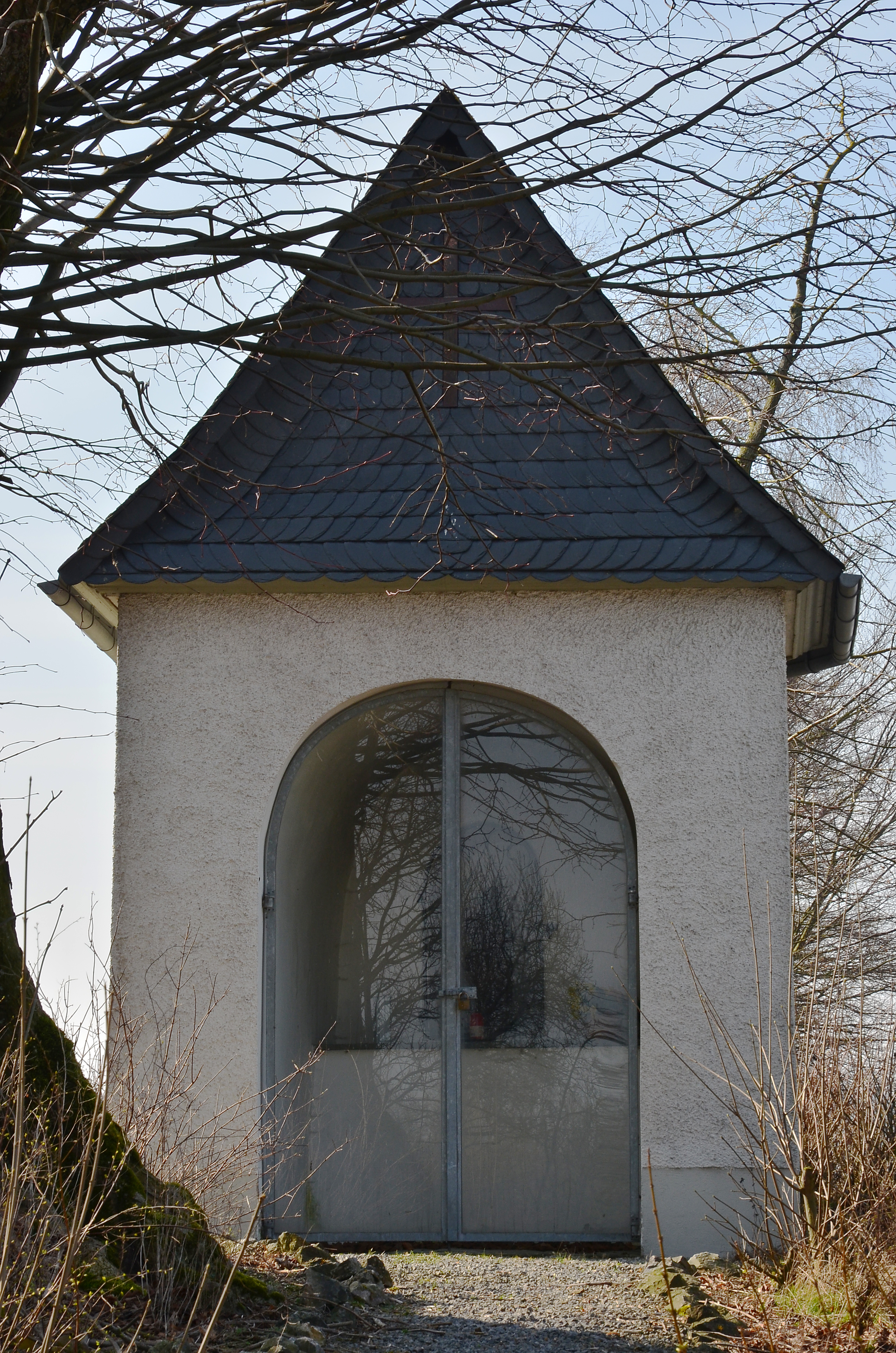 Die kleine Kapelle steht an der B7 zwischen Brilon und Altenbüren